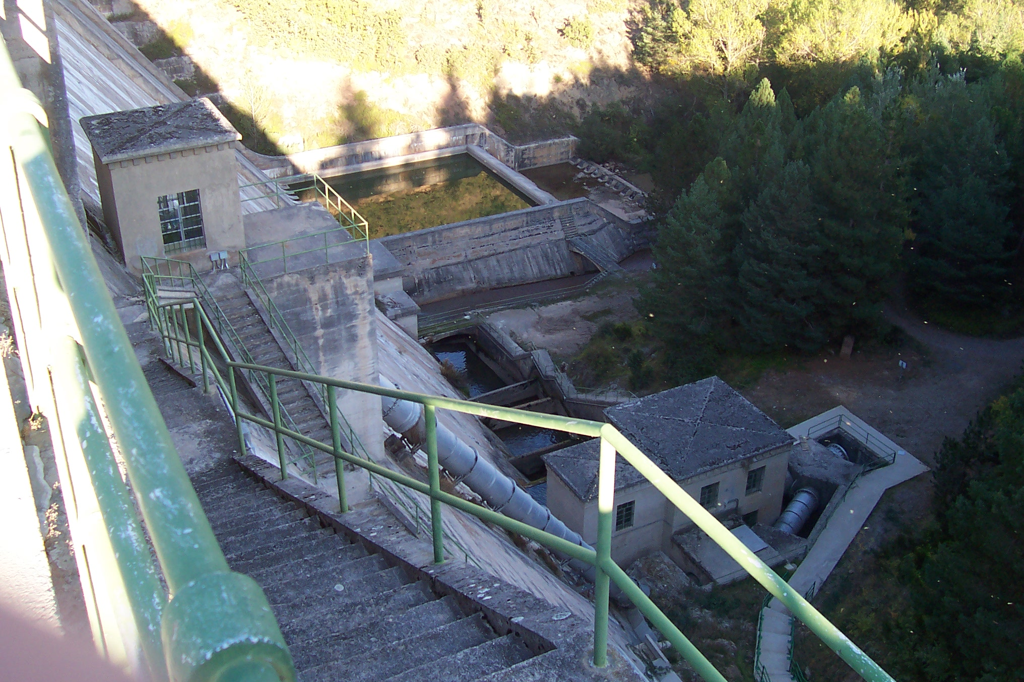 Presa del embalse González-Lacasa en La Rioja.